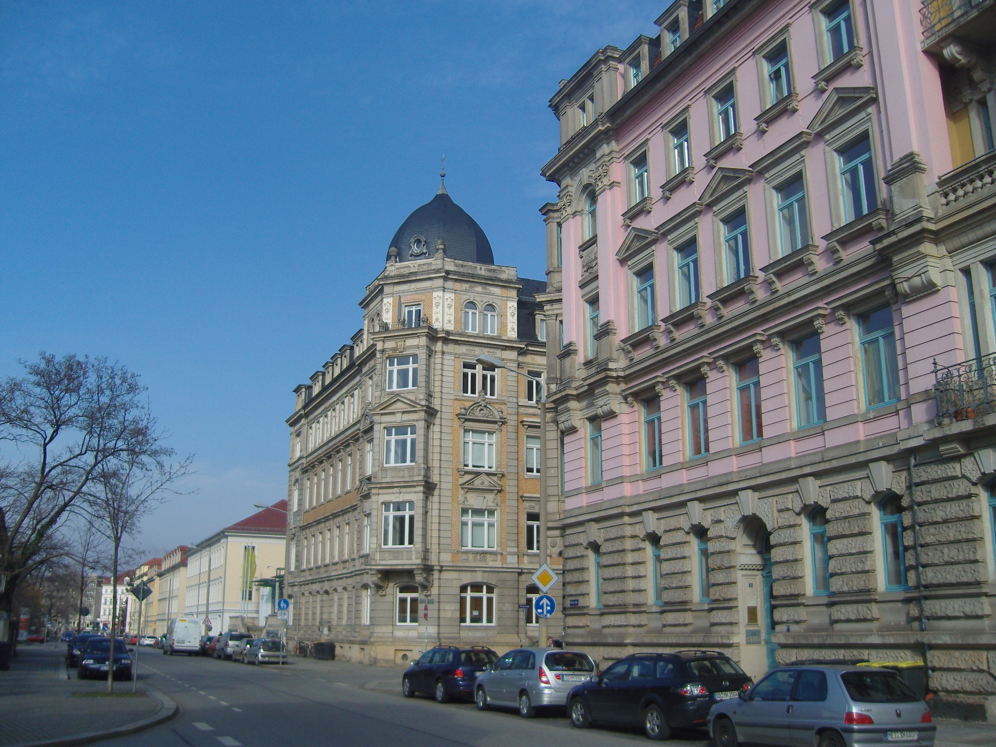 Blick in die Glacisstraße im Vordergrund Denkmalgeschütztes Gebäude Nr. 24 dahinter Glacisstraße 26